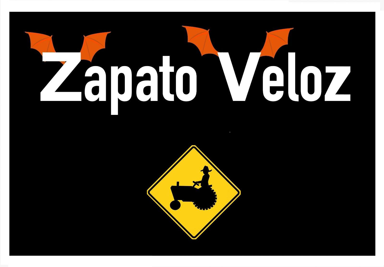 ZAPATO VELOZ - nueva formación 2019 - Abierta contratación - Sinergia Ent. tel. 629 269 579